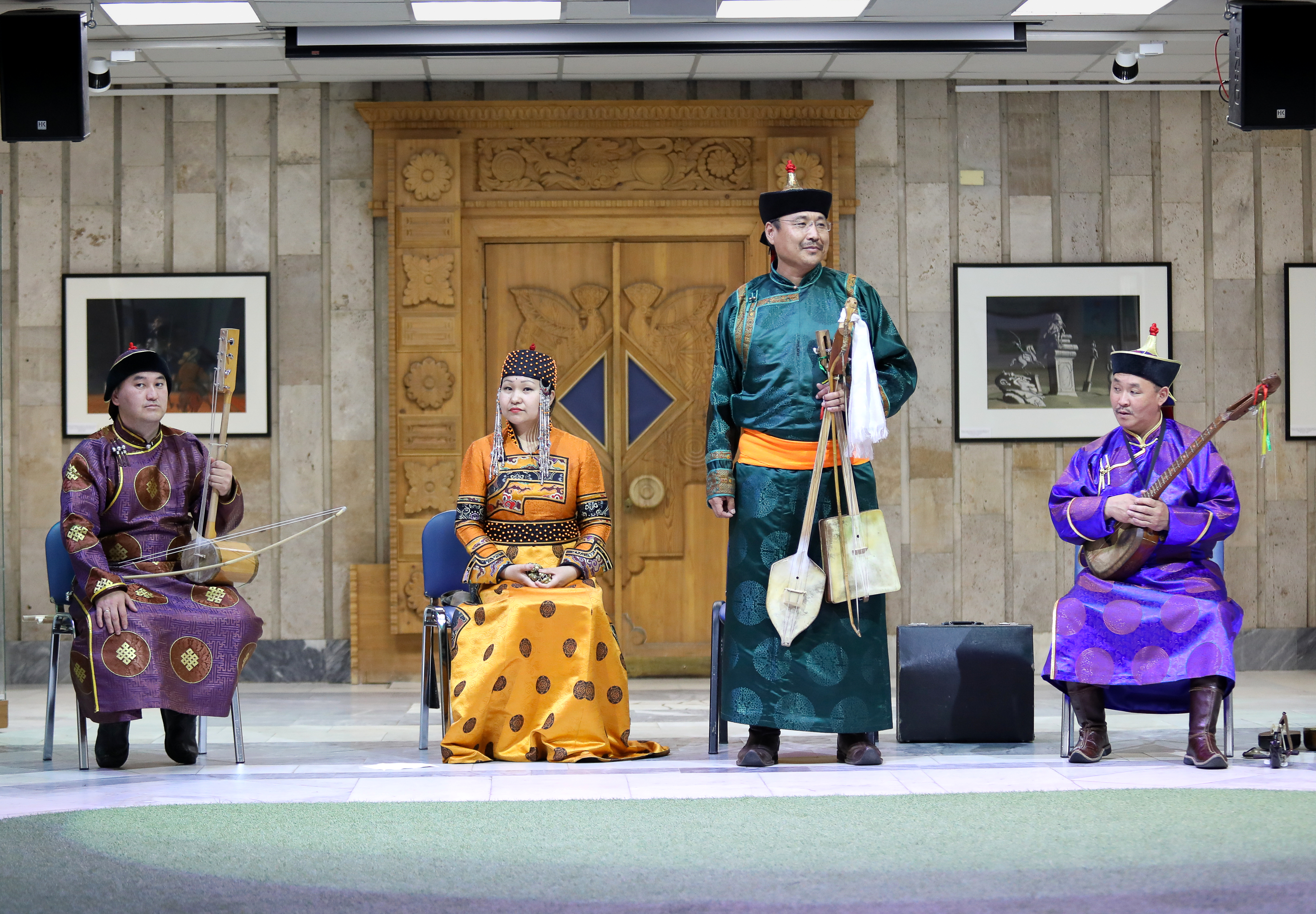 Фольклорный ансамбль "Чиргилчин" в Российской государственной детской библиотеке. Слева направо: Айдын Тыва, Айдысмаа Кошкендей, Игорь Кошкендей, Монгун-оол Ондар.